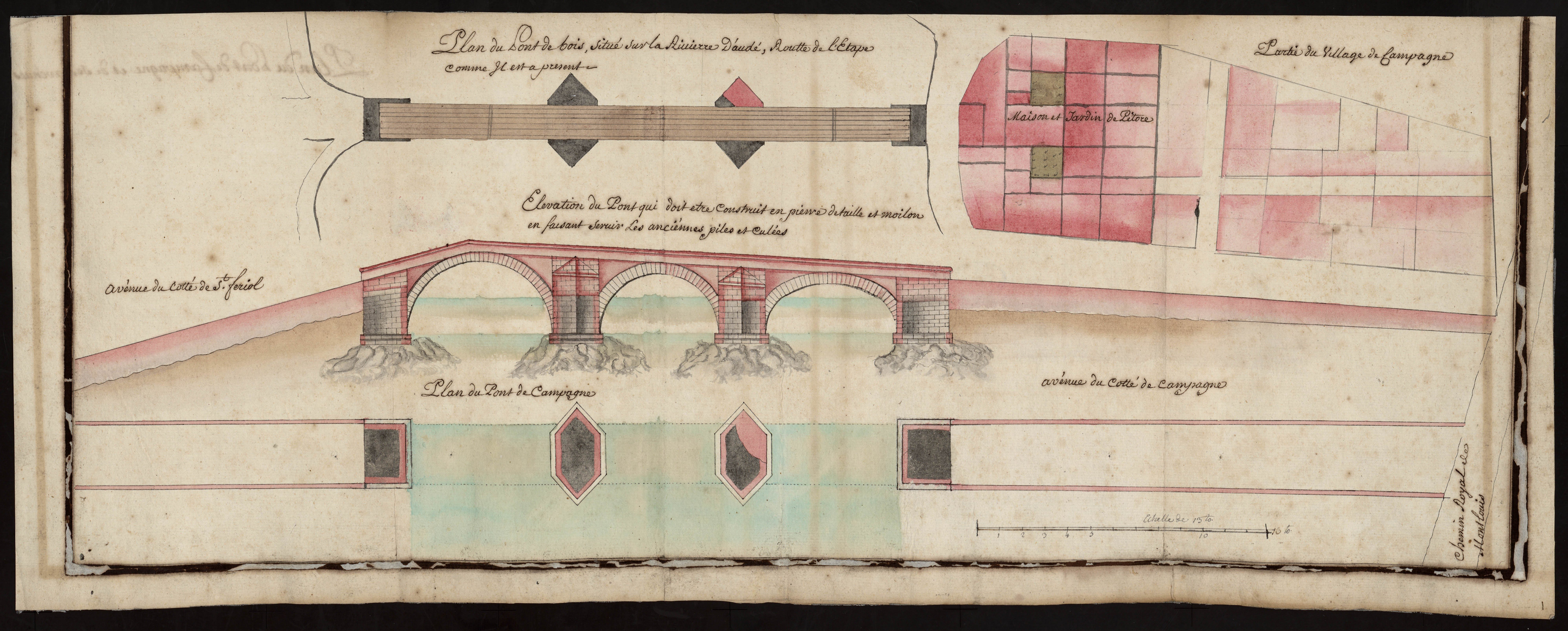 Campagne : plan et élévation du pont de Campagne, sur la rivière de l'Aude.